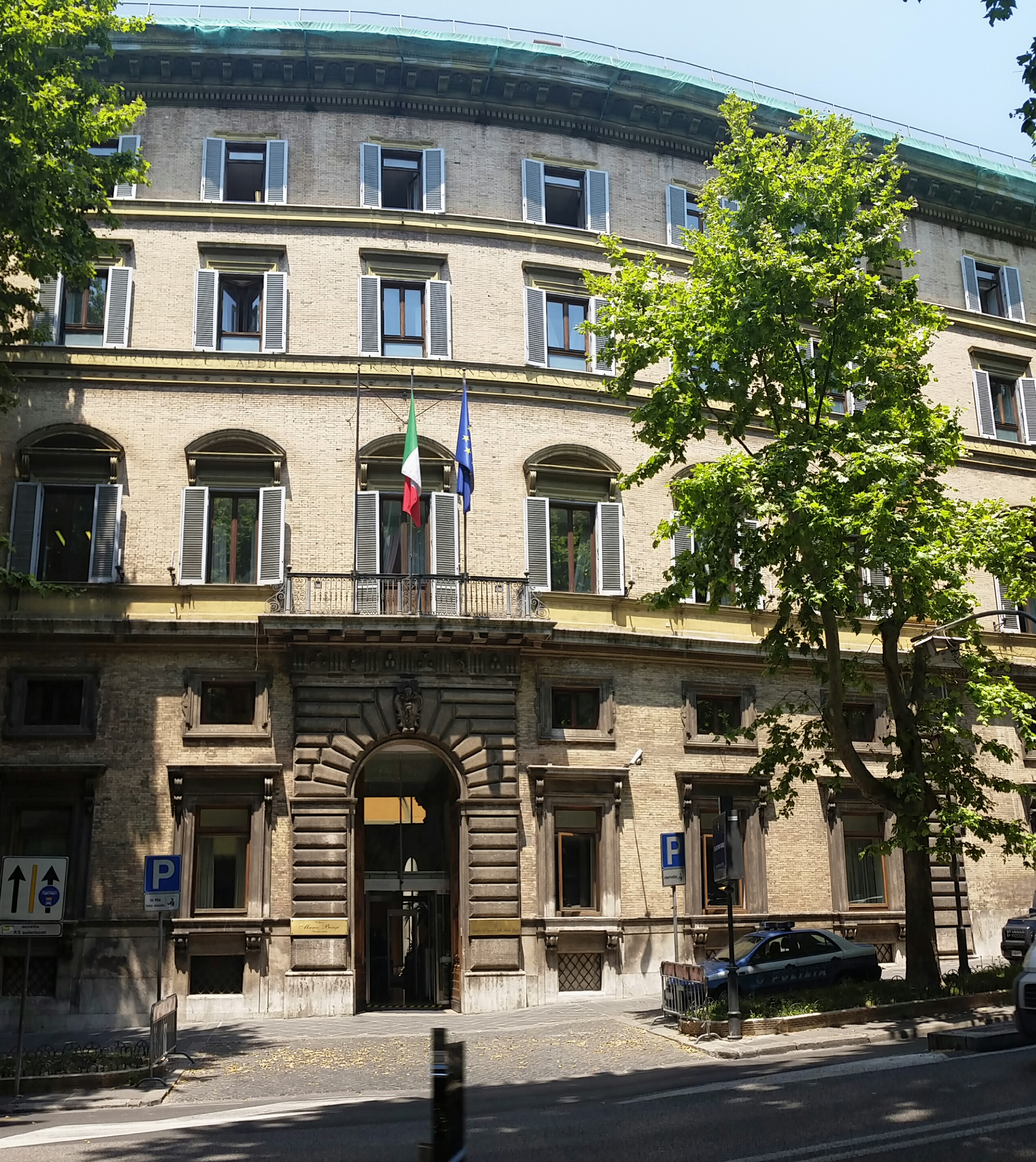 Sede del Ministero del Lavoro e delle Politiche Sociali a Roma, Via Veneto 56